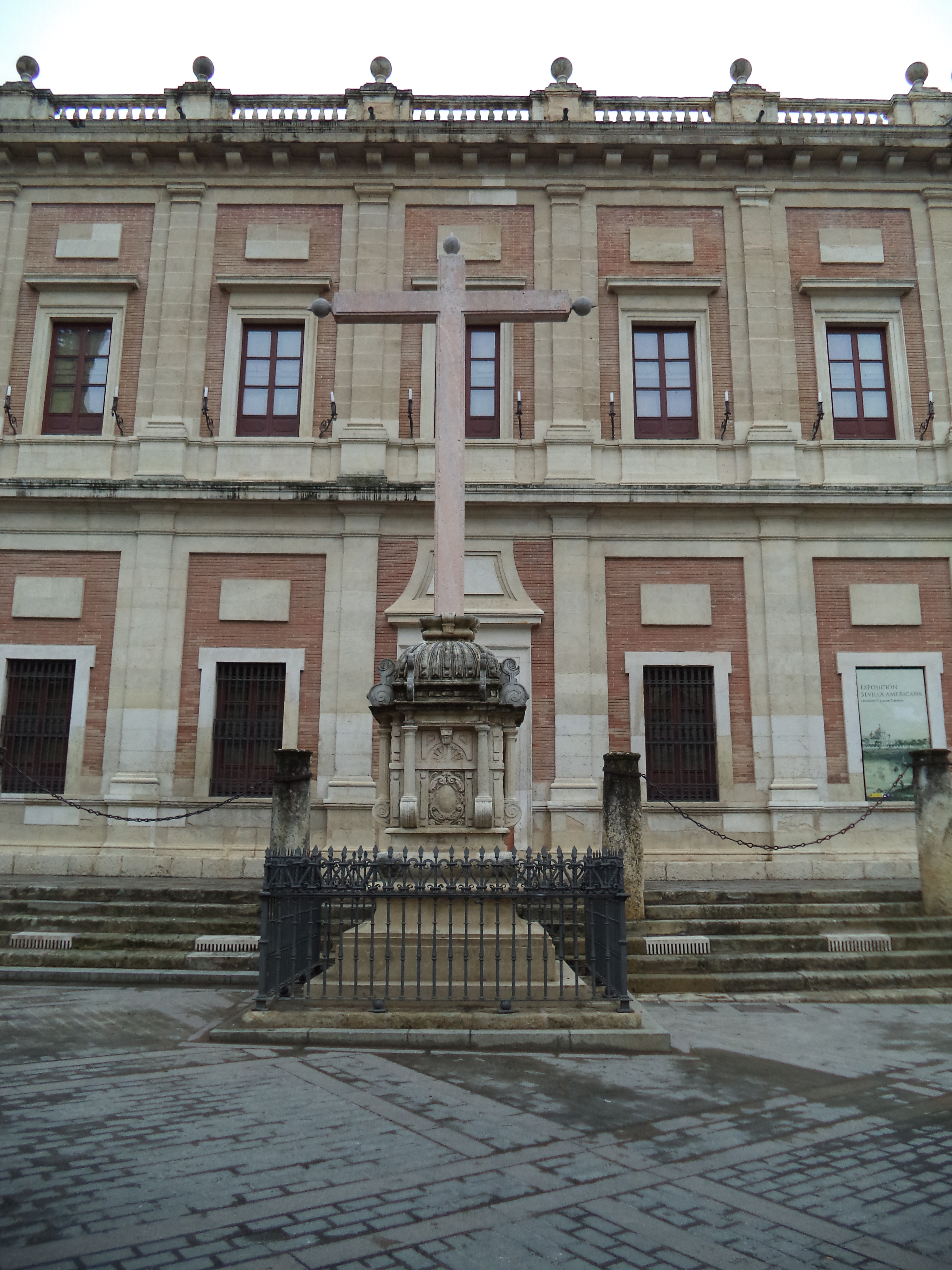 Cruz del Juramento en la antigua Casa Lonja de Sevilla